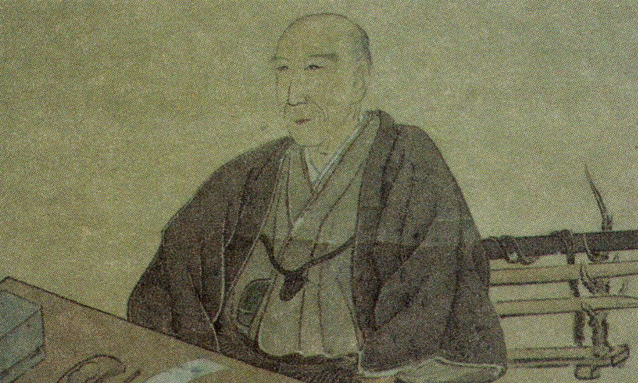 留守居・戸川安清の肖像画(部分)。